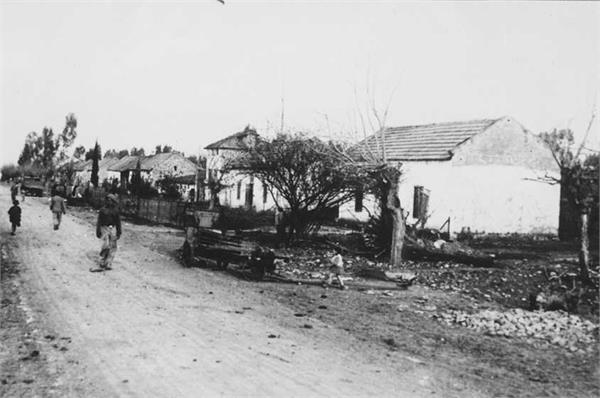 יסוד המעלה - מראה המושבה